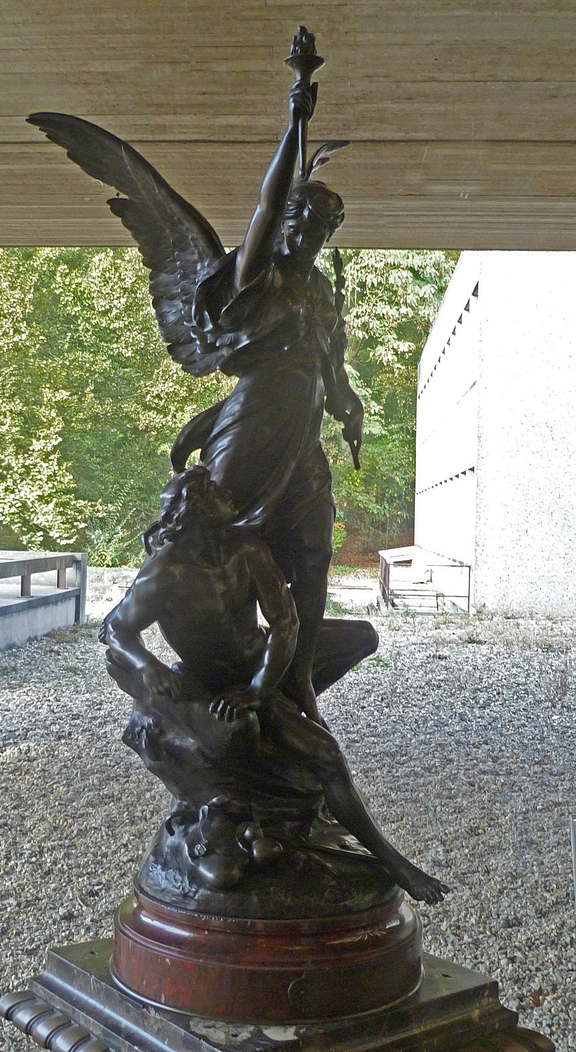 "Le génie du progrès", sculpture en bronze par Émile-Louis Picault (1833-1915), représentant une Victoire ailée (Nikè); Musée de Mariemont, Belgique